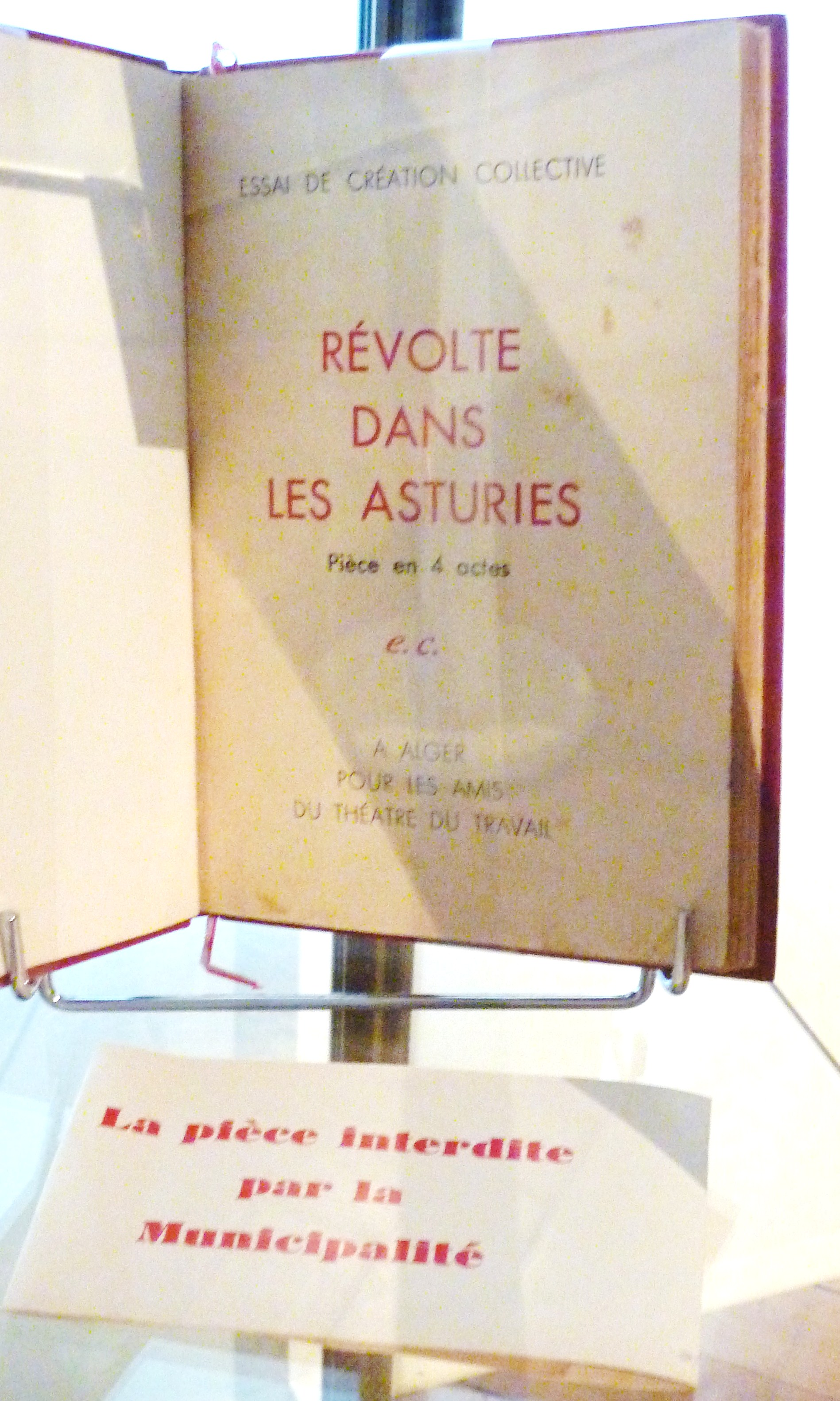 Couverture de "Révolte dans les Asturies", "essai de création collective" auquel participe Albert Camus, pièce interdite par la municipalité d'Alger, 1936. Document présenté dans l'exposition organisée en 2015 au Musée de Pézenas en hommage à Edmond Charlot.